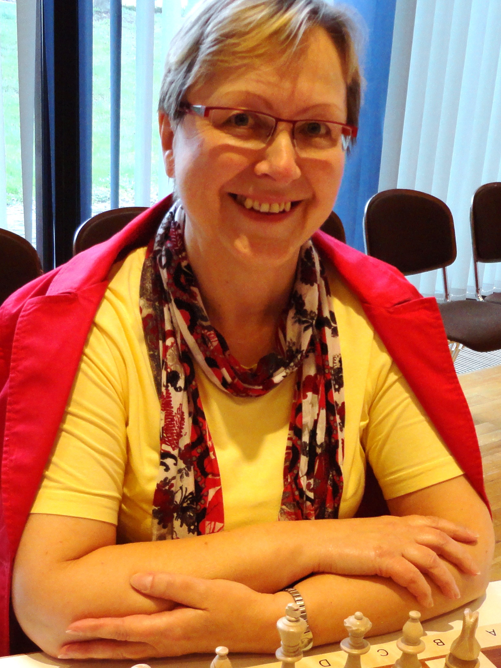 Brigitte Burchardt, Deutsche Schachbundesliga der Frauen Saison 2011/12, Finalrunden in Gladenbach.